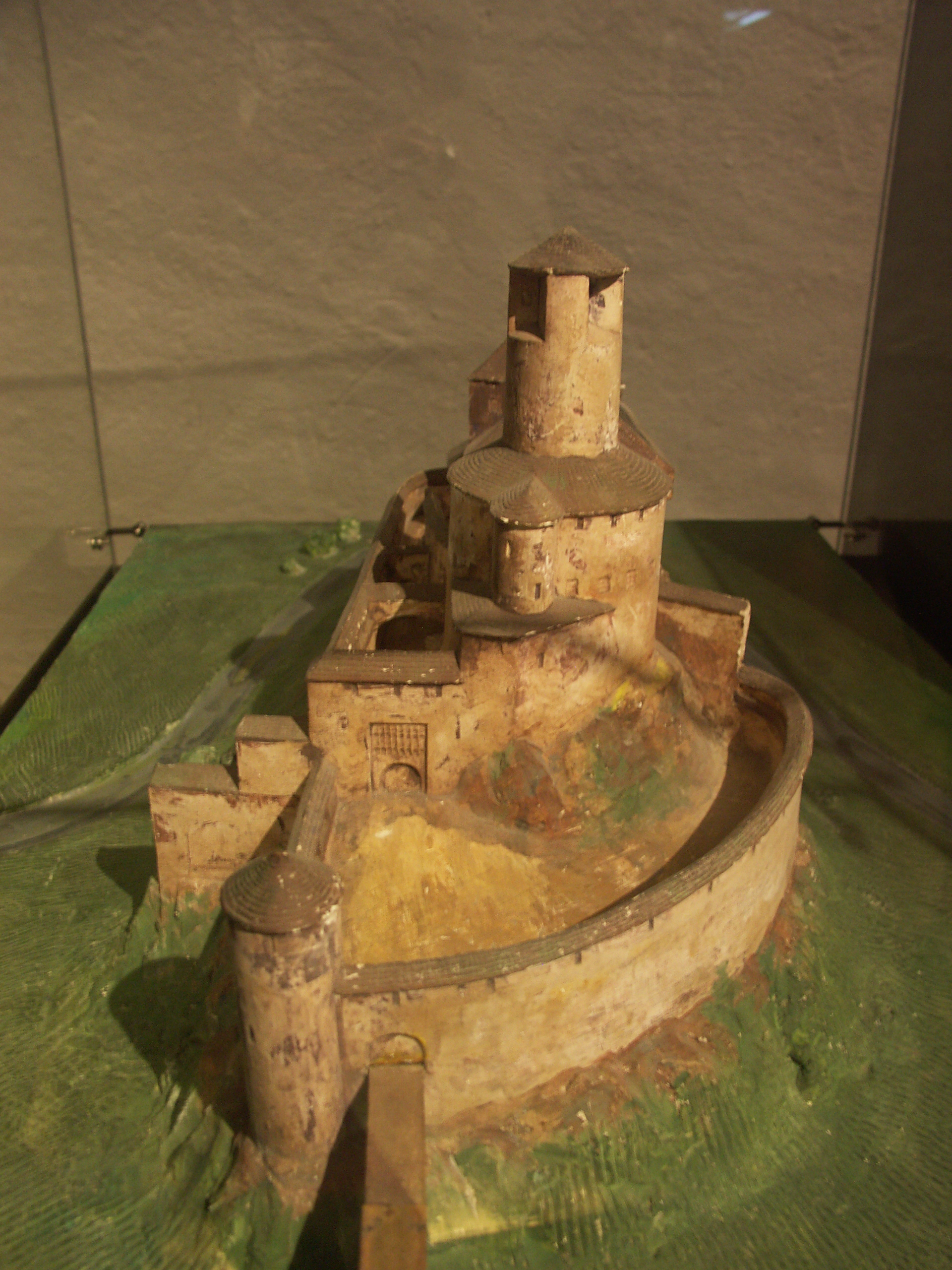 Modell von Schloss Weesenstein (Zeitpunkt dieser Ausbaustufe ist mir z.Zt. nicht bekannt)